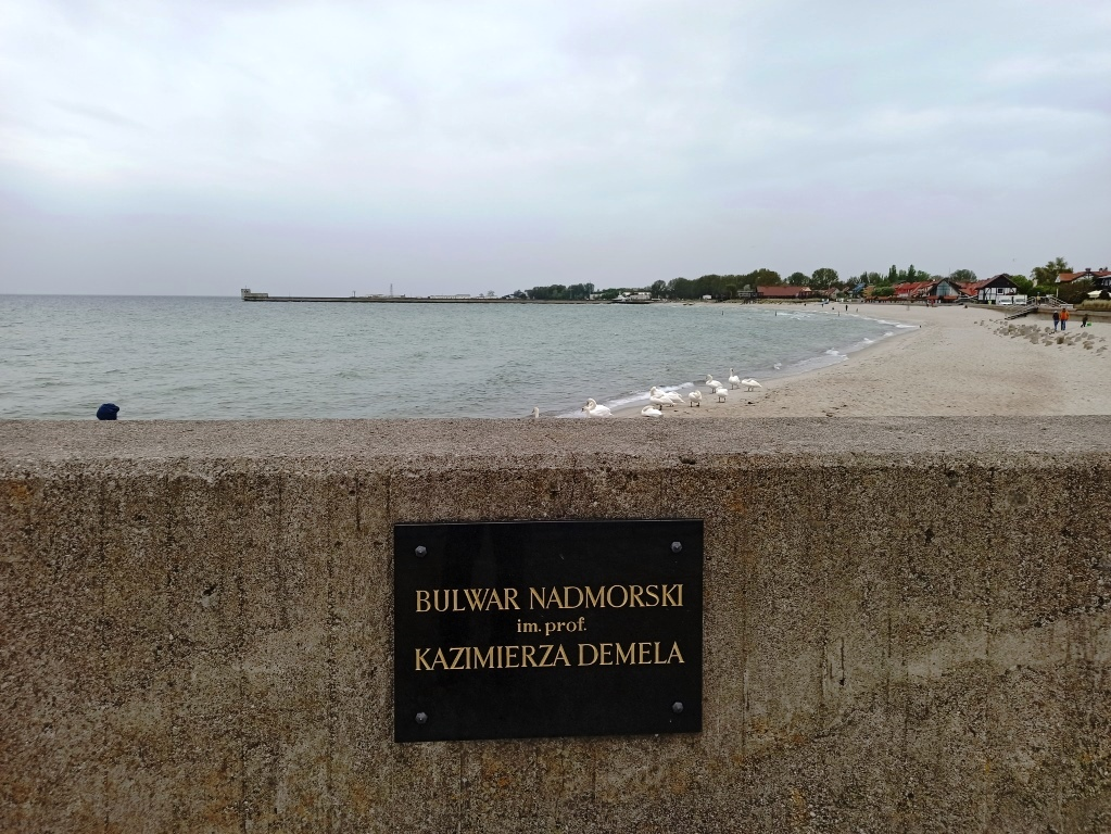 Hel Bulwar nadmorski Kazimierz Demel